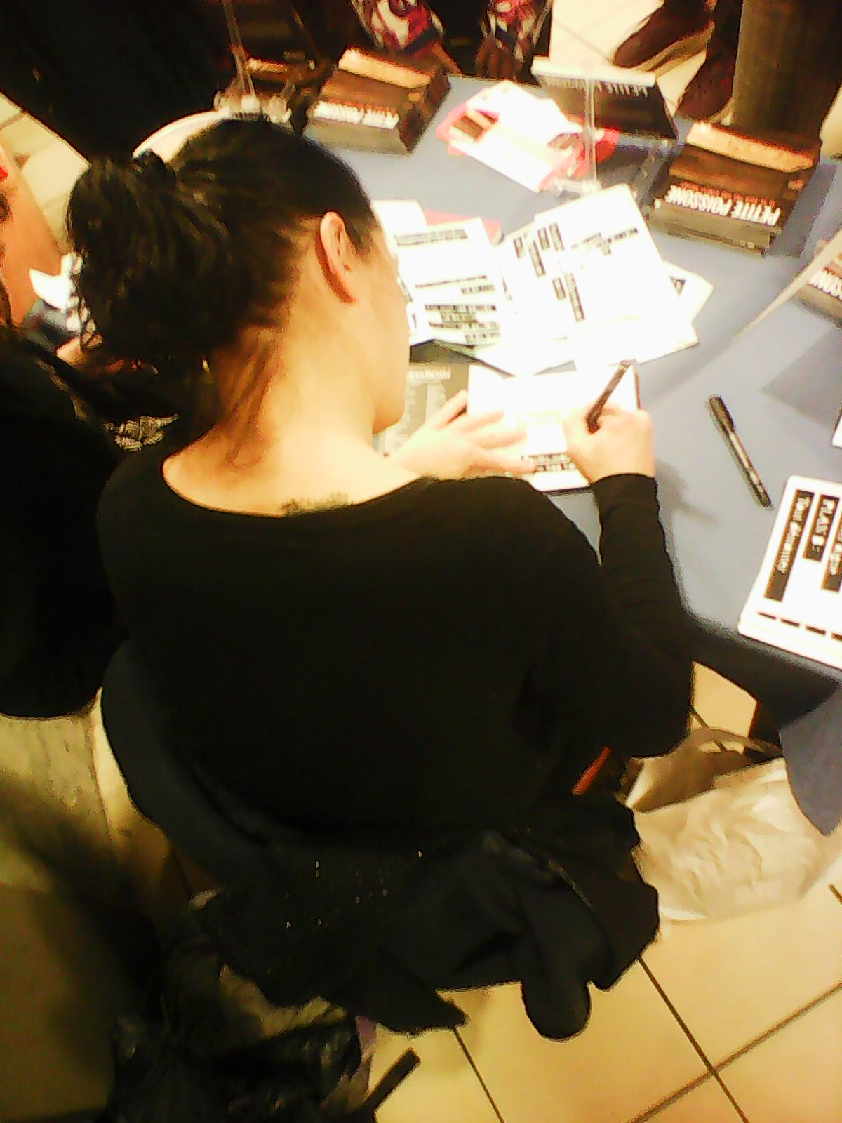 L'artiste petite poissonne dédicace son livre à Grenoble en decembre 2018